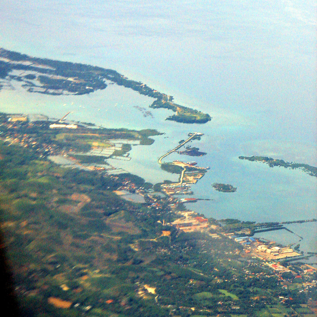 Carmen, Cebu, Philippines